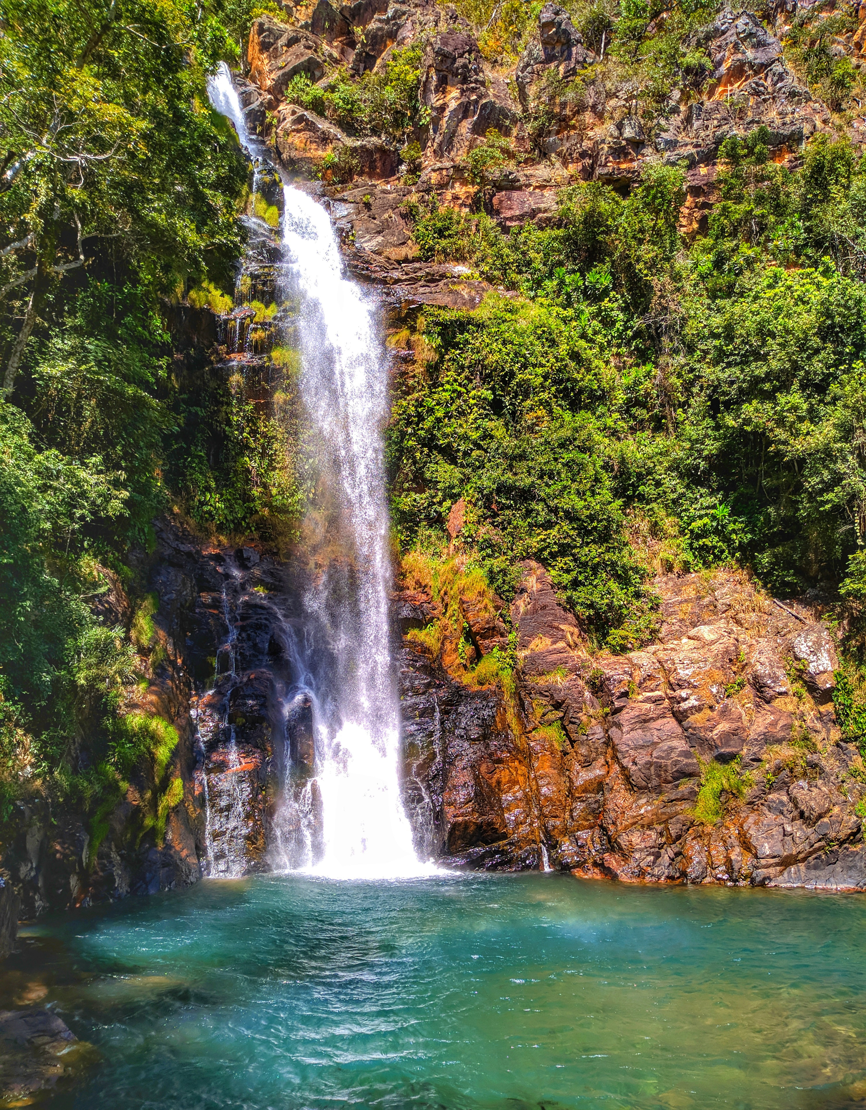 Cachoeira símbolo do Parque Estadual Serra Azul.